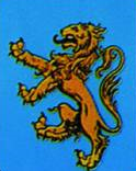 Stendardo del Rione San Francesco